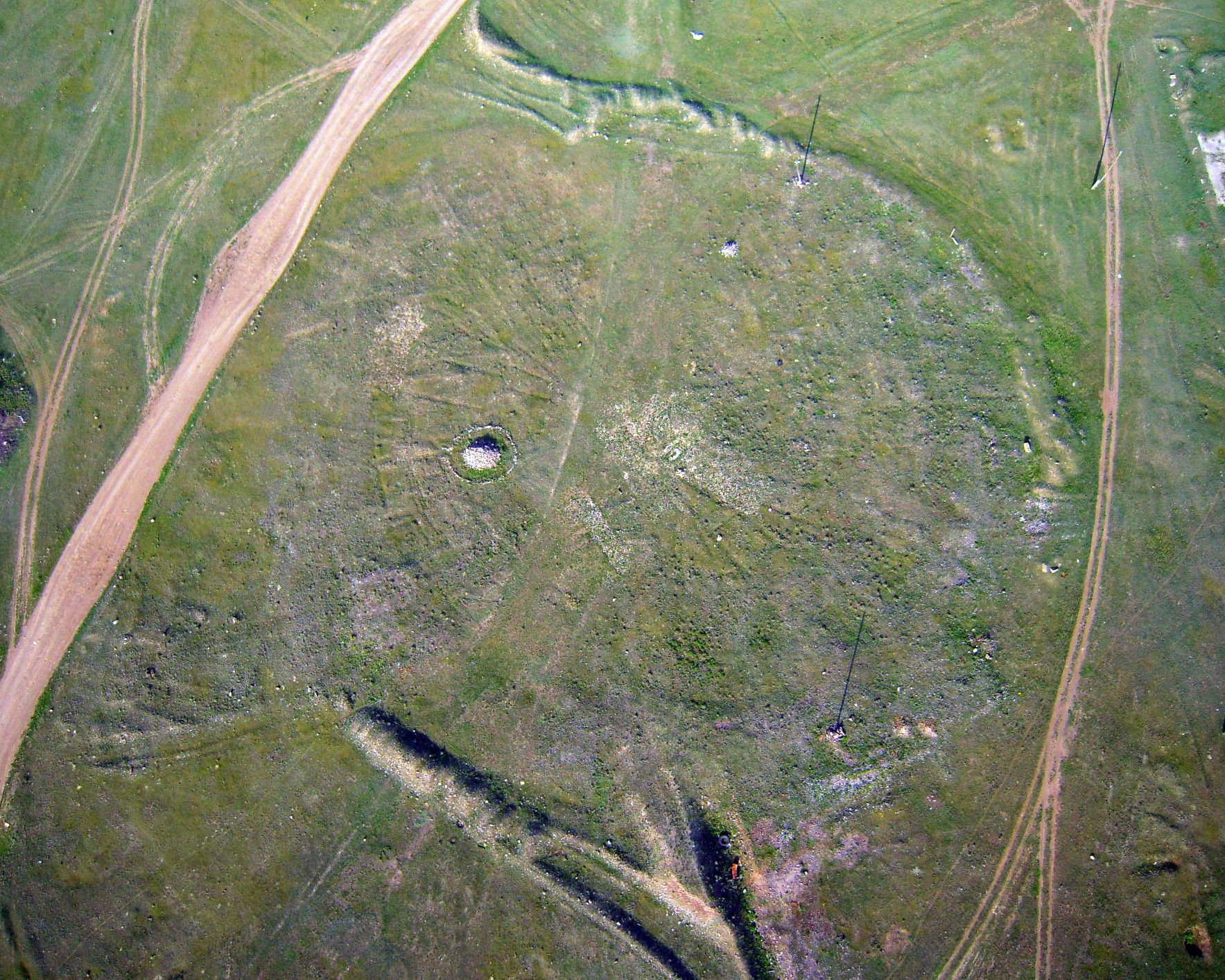 Курган Аржаан-1. 2012 год.